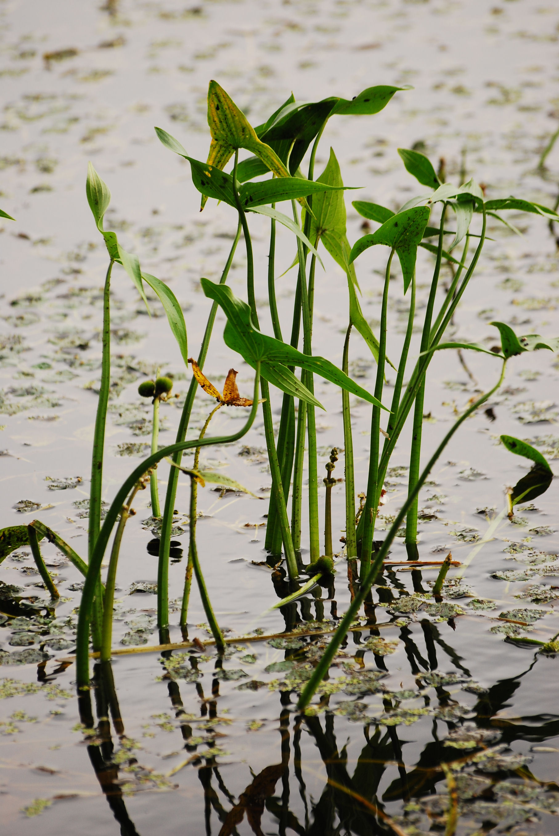 Sagittaria sagittifolia rezerwat Łężczok w powiecie raciborskim